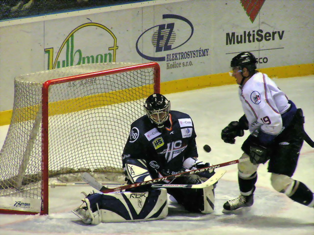 HC Košice vs. Lipt. Mikuláš, Prípravný zápas KE-LM 1.9.06.jpg